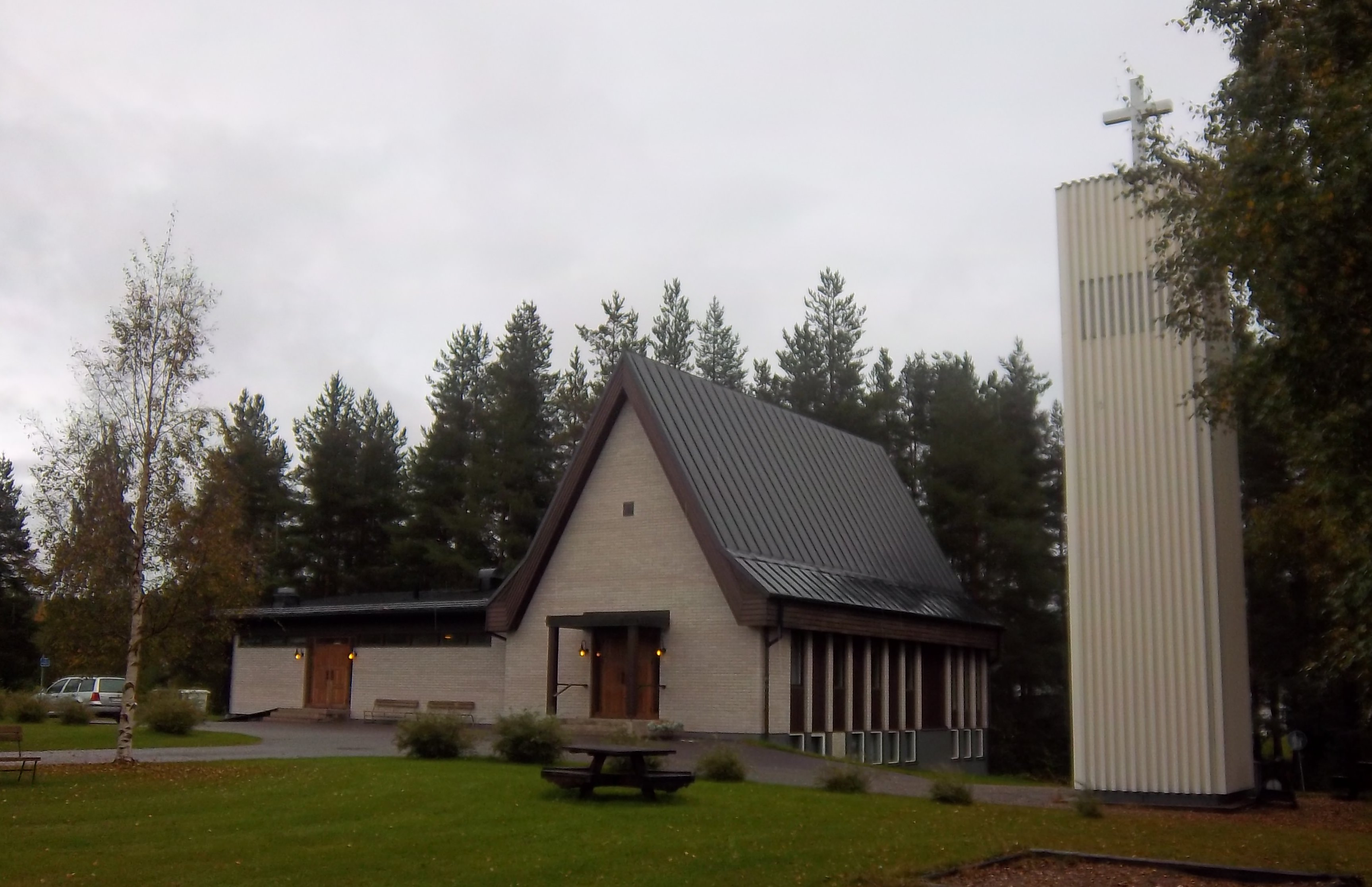 Vidsels kyrka en mulen eftermiddag i september